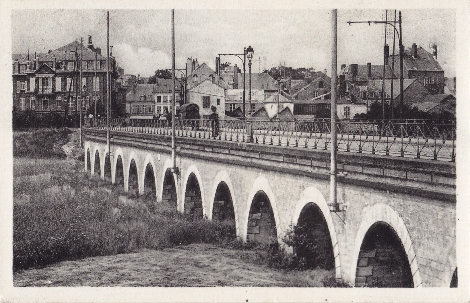 Carte postale ancienne éditée par CAP, n°57 :SEDAN - Le Viaduc de Torcy